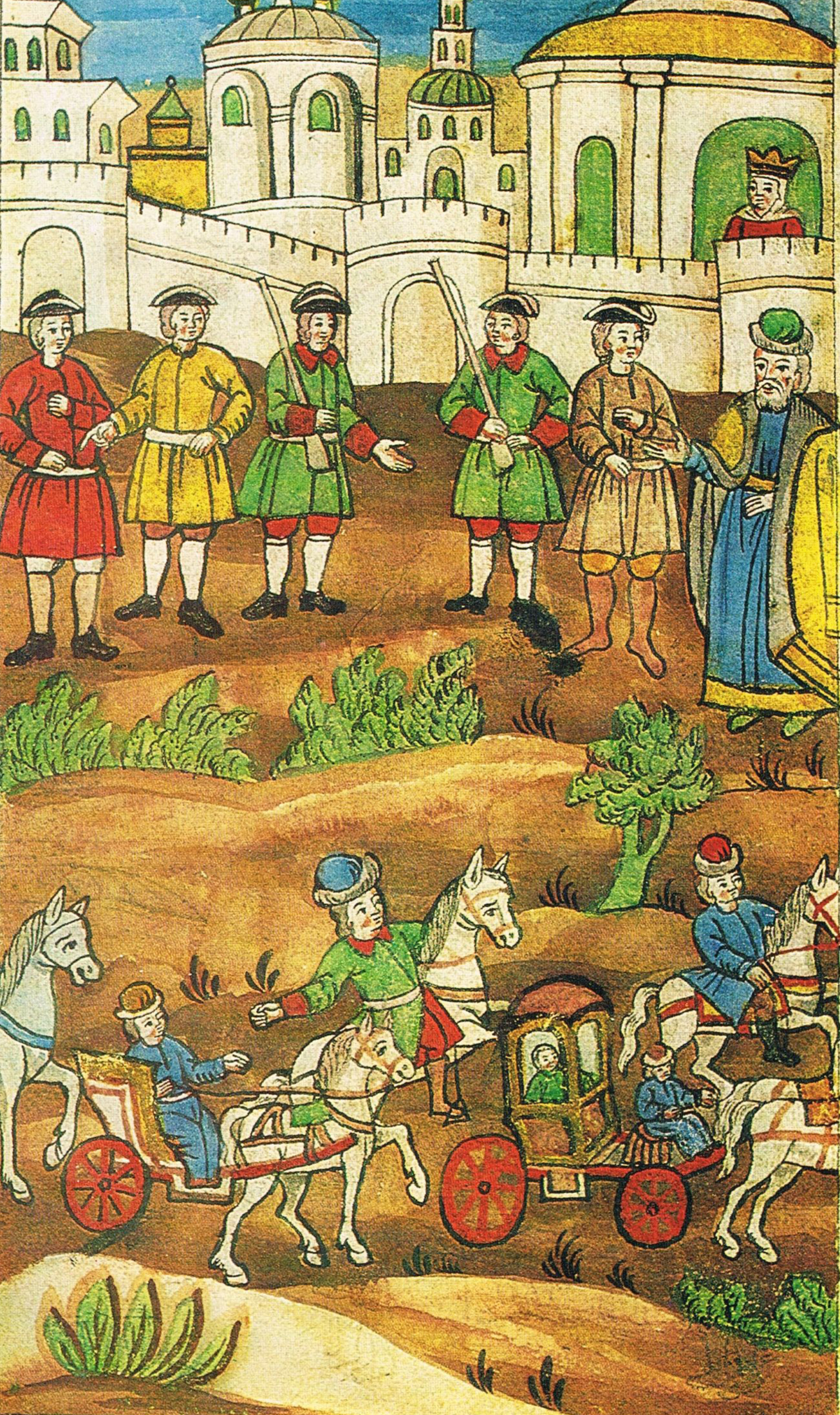 Заточение царевны Софьи в Новодевичий монастырь в 1689 году Миниатюра из рукописи 1-й пол. 18 века "История Петра I", соч. П. Крекшина. Собрание А. Барятинского. ГИМ.